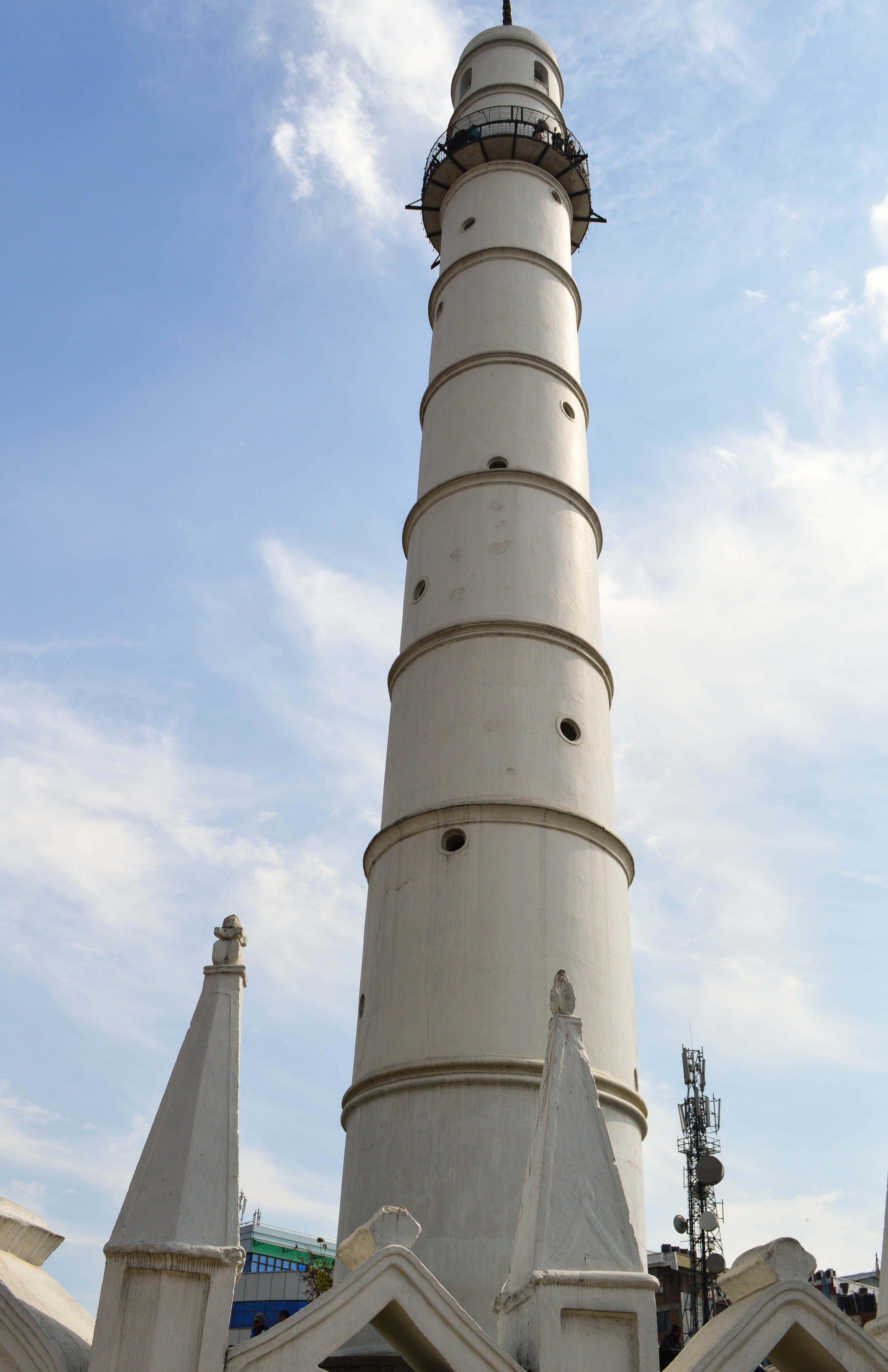 Dharahara tower